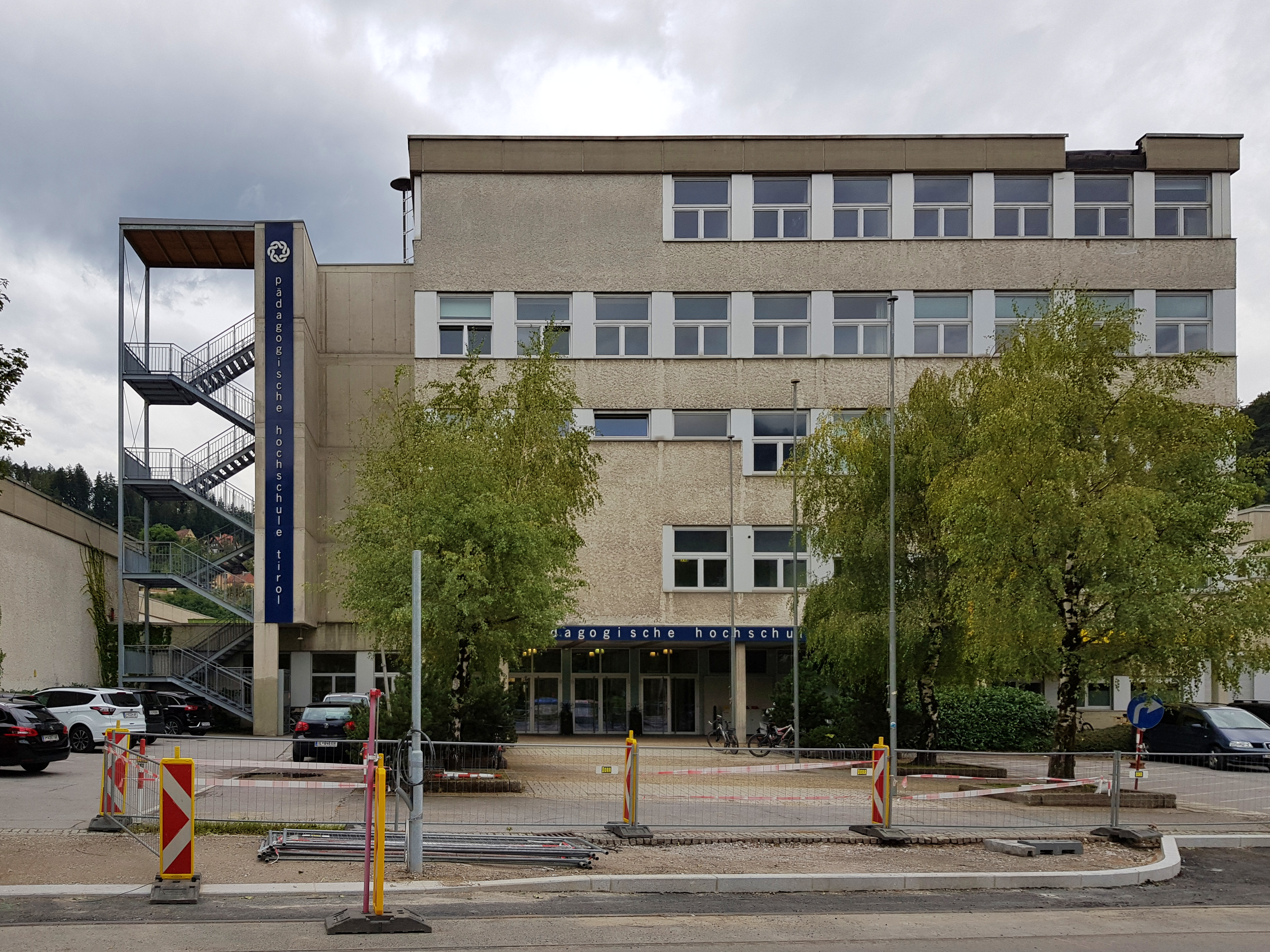 Pädagogische Hochschule Tirol This media shows the remarkable cultural object in the Austrian state of Tyrol listed by the Tyrolean Art Cadastre with the ID 68582. (on tirisMaps, pdf, more images on Commons, Wikidata)